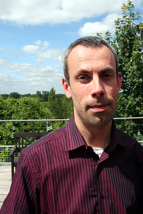 Fabrice Neaud (comic book artist) 2e Université d'été de la bande dessinée, Angoulême.